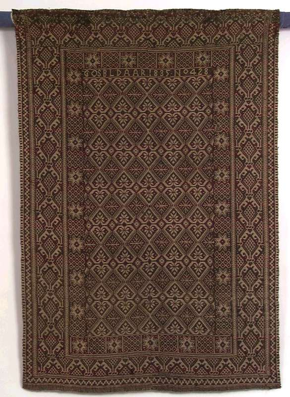 Åkle vevet i dobbeltvev av Berit Hilmo i 1835. Det har kommet fra Tydal i Sør-Trøndelag. Innskriften GOS BLD AAR 1835 NO 428 forteller at det er vevet til Ole Gudmundsen Hilmo og Berte Larsdatter. Foto Anne-Lise Reinsfelt/Norsk Folkemuseum, NF.1910-0433.